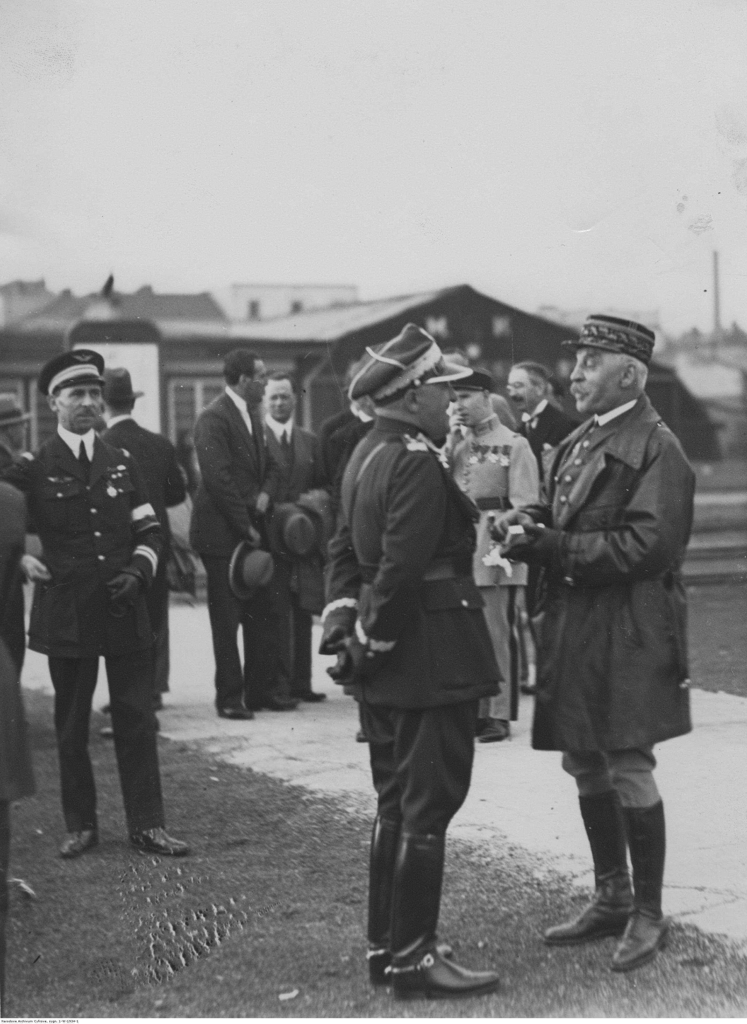 Inspektor francuskiego lotnictwa generał Emile Hergault z wizytą w Warszawie. Powitanie na lotnisku Mokotowskim. Na pierwszym planie widoczni od lewej: gen. Tadeusz Piskor, gen. Emile Hergault. Koncern Ilustrowany Kurier Codzienny - Archiwum Ilustracji. Sygnatura: 1-W-1934-1